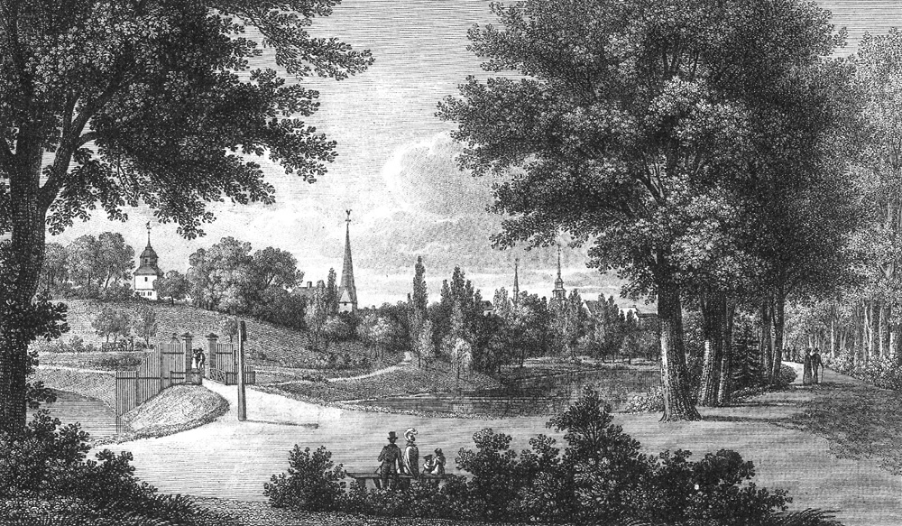 Bildvorlage von Anton Radl (1774–1852) aus dem Jahr 1818/1819: Ostertor-Wall mit Brücke am Bischofstor und Contrescarpe (rechts)